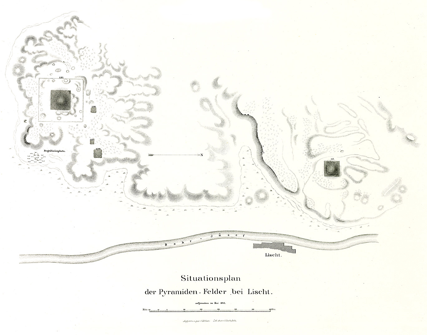 Denkmaeler aus Aegypten und Aethiopien nach den Zeichnungen der von Seiner Majestät dem Koenige von Preussen, Friedrich Wilhelm IV., nach diesen Ländern gesendeten, und in den Jahren 1842–1845 ausgeführten wissenschaftlichen Expedition auf Befehl Seiner Majestät